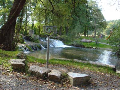 Wasserspielplatz in Weismain, selbst erstellt am 26.09.2003